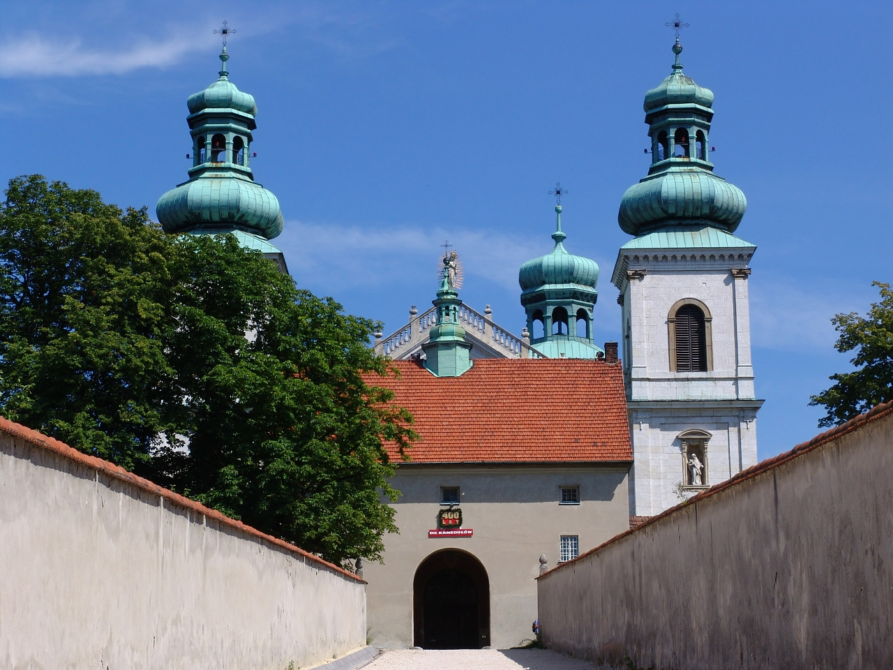 Klasztor Kamedułów na Bielanach w Krakowie